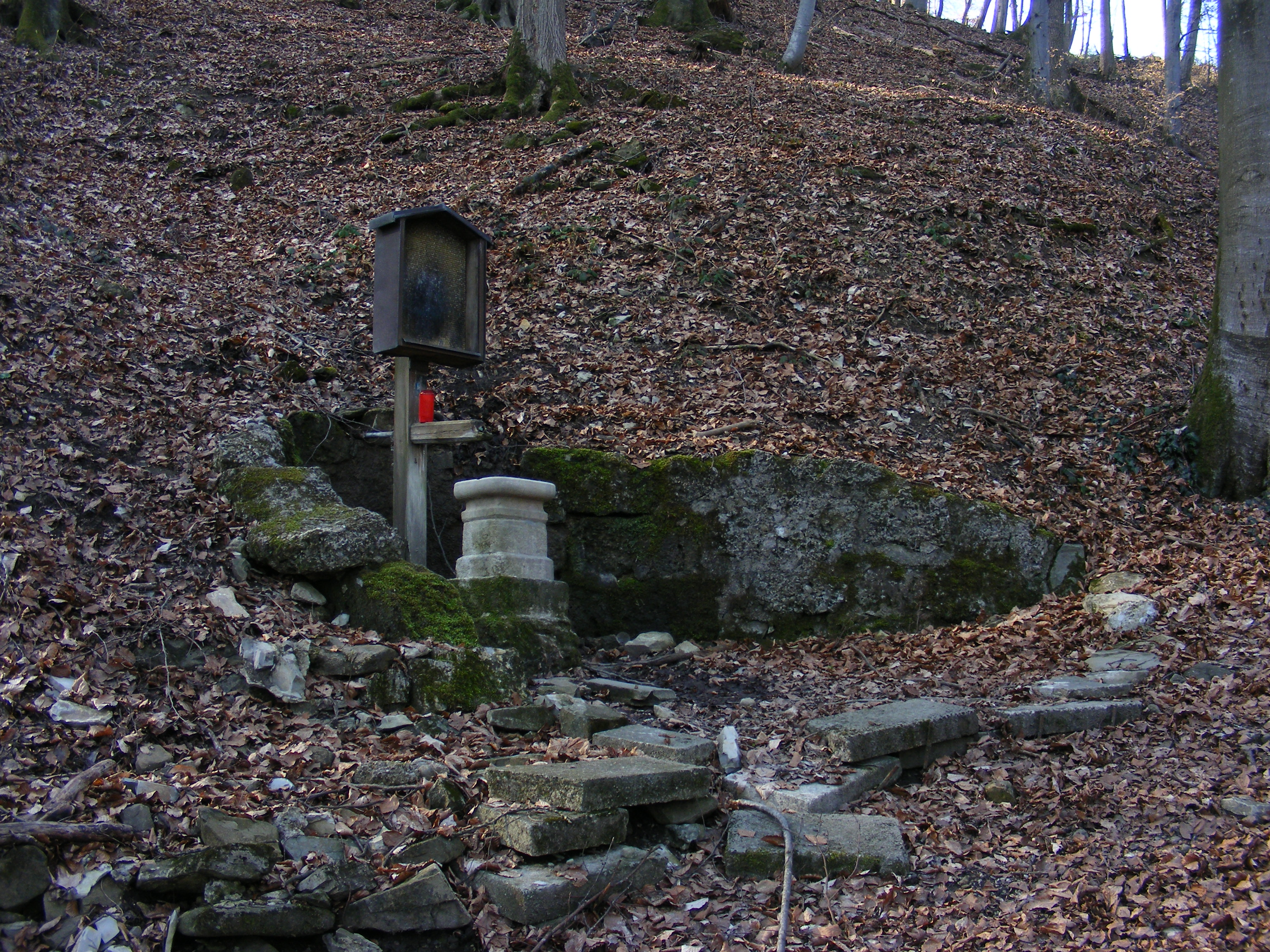 das "Augenbründl" auf dem Plainberg, Bergheim, Land Salzburg